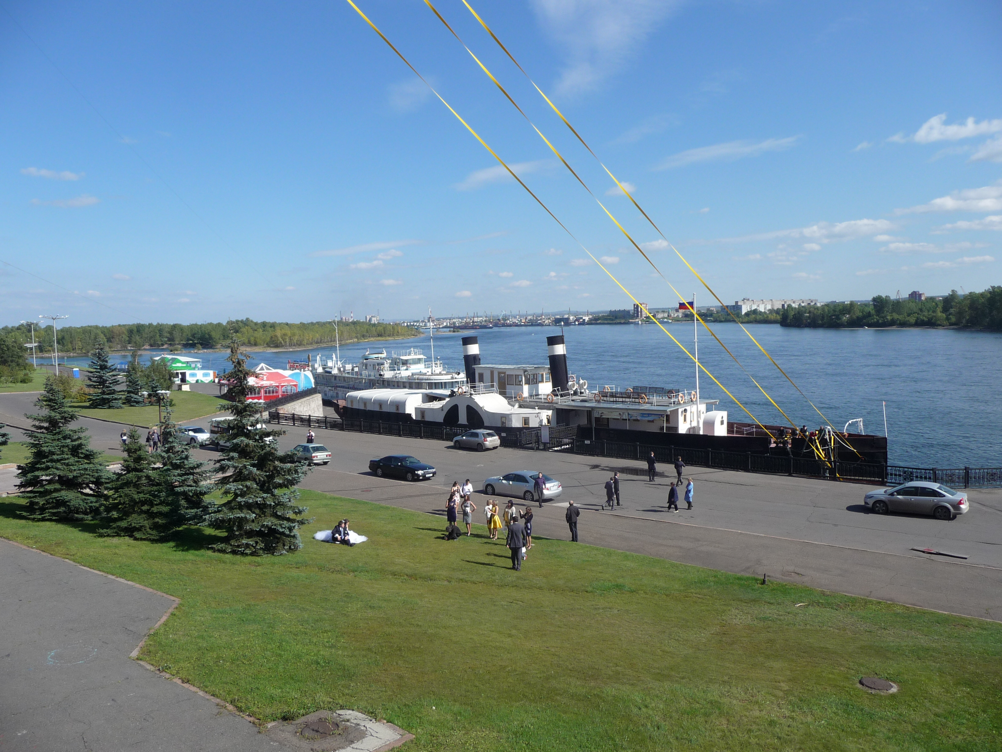 Святитель Николай (пароход-музей).